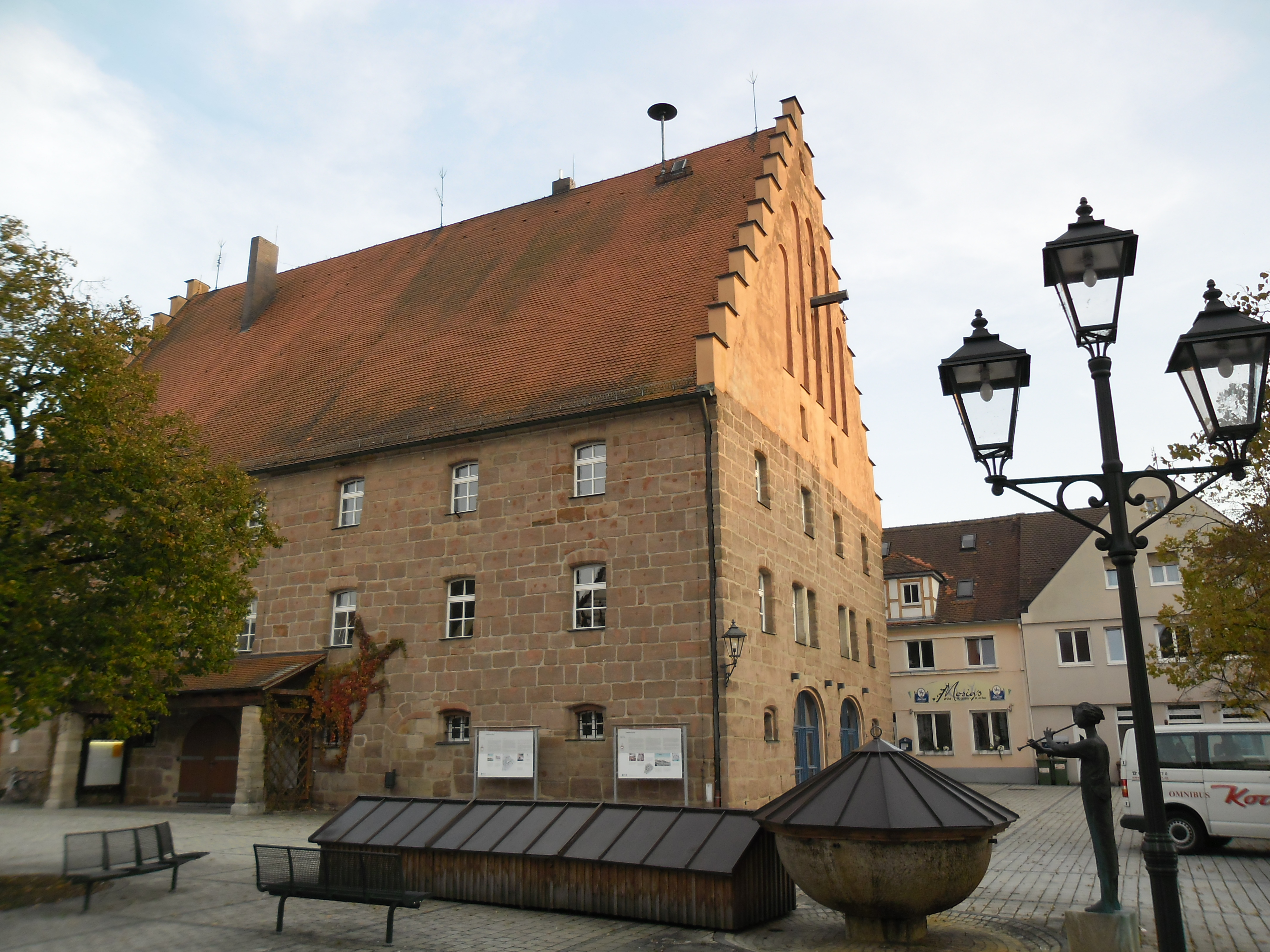 Spätgotisches Rathaus in Heideck